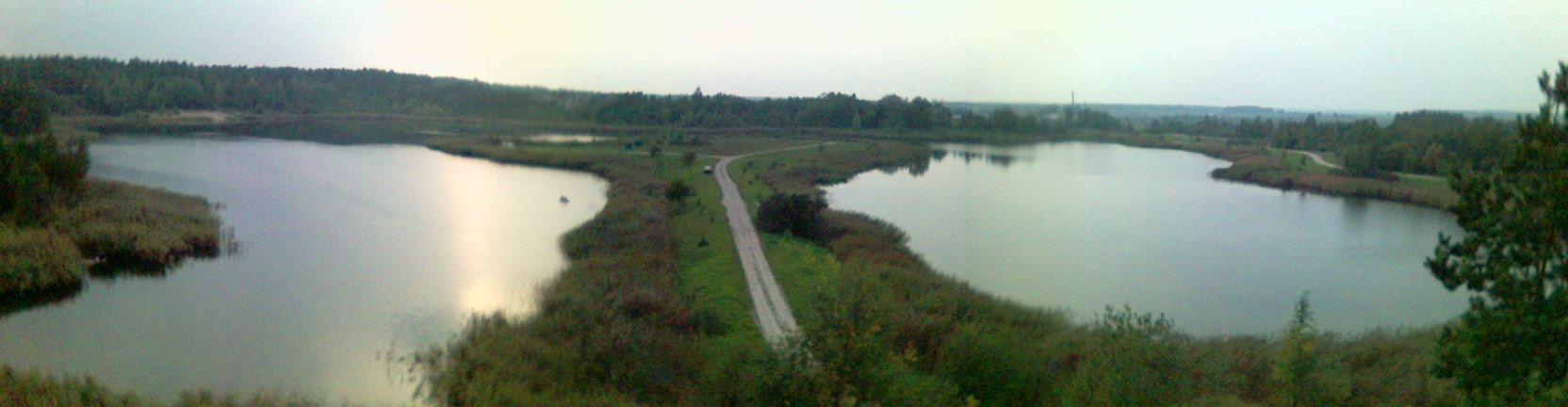 Babėnų karjero panorma 2006.10.01 Autorius: Hugo20px